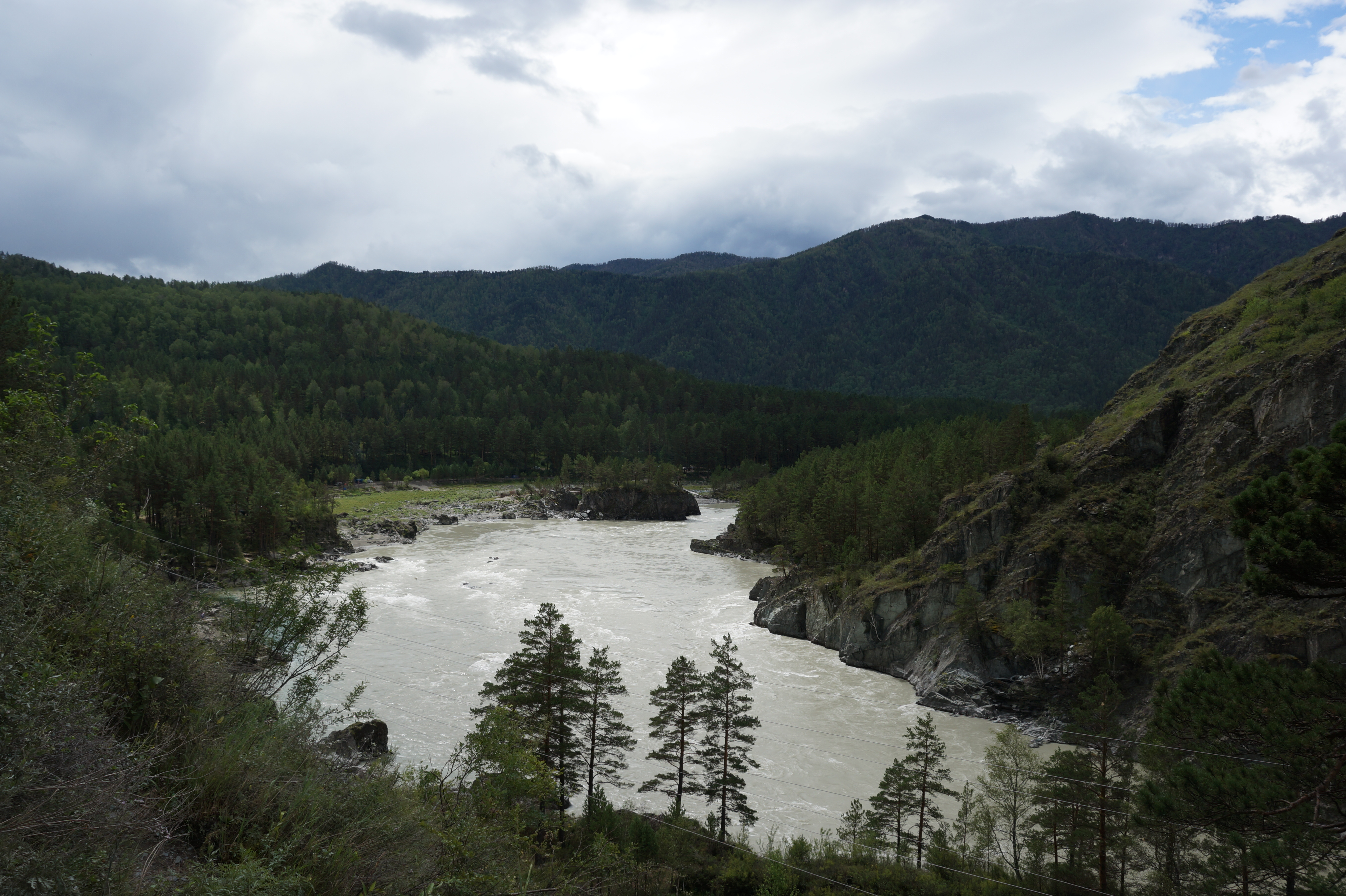 Курорт Чемал: Шебалинский район, Алтай This image is related to the protected area of Russia number 0410057